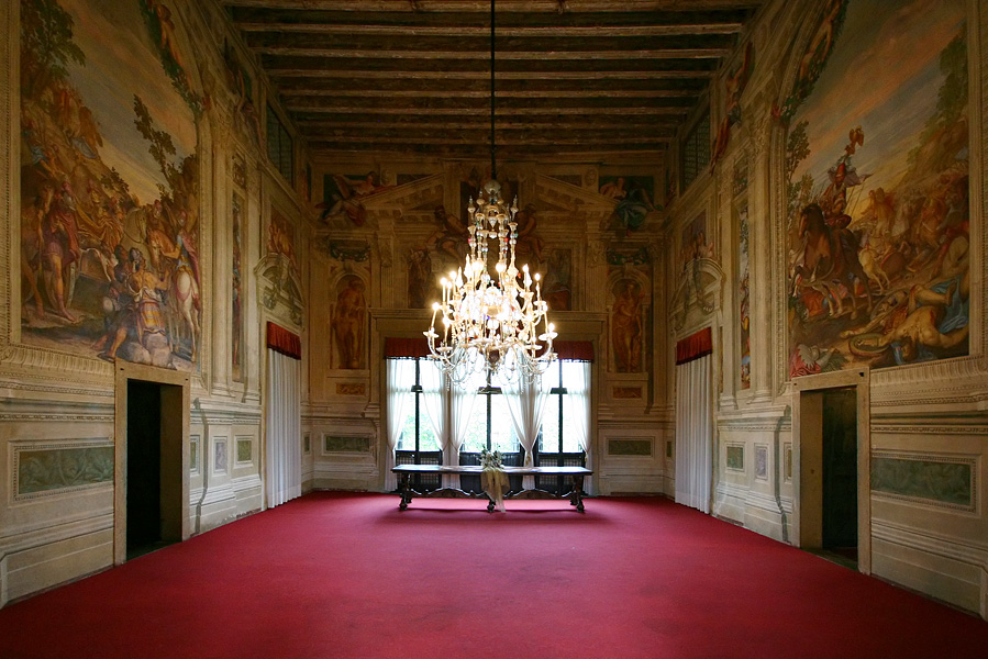 Villa Godi Valmarana, Lonedo di Lugo, Veneto, Italy, zentraler Saal